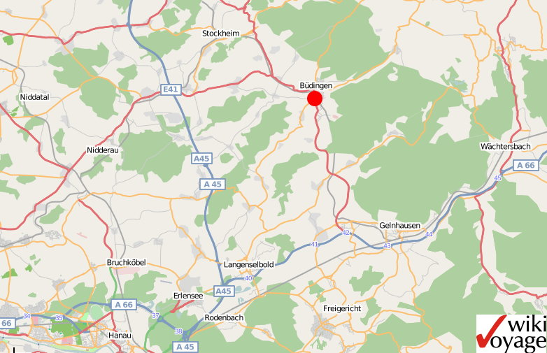 Lage von Büdingen